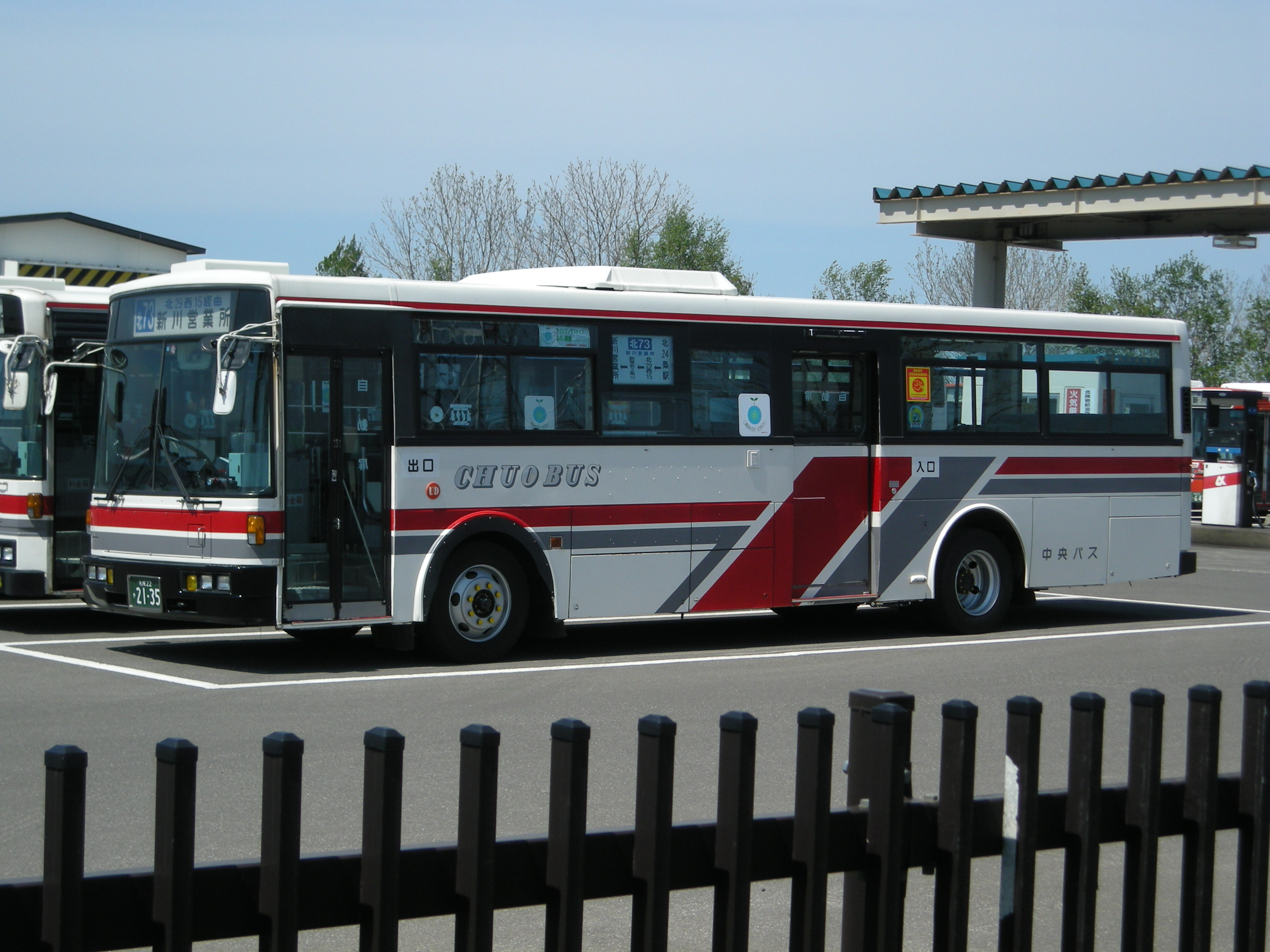 登録番号・札幌22か21-35 メーカー・日産ディーゼル（富士重工架装・ツーステップ低床車） 2004年札幌市営バス廃止に伴って北海道中央バスへ移譲された車両